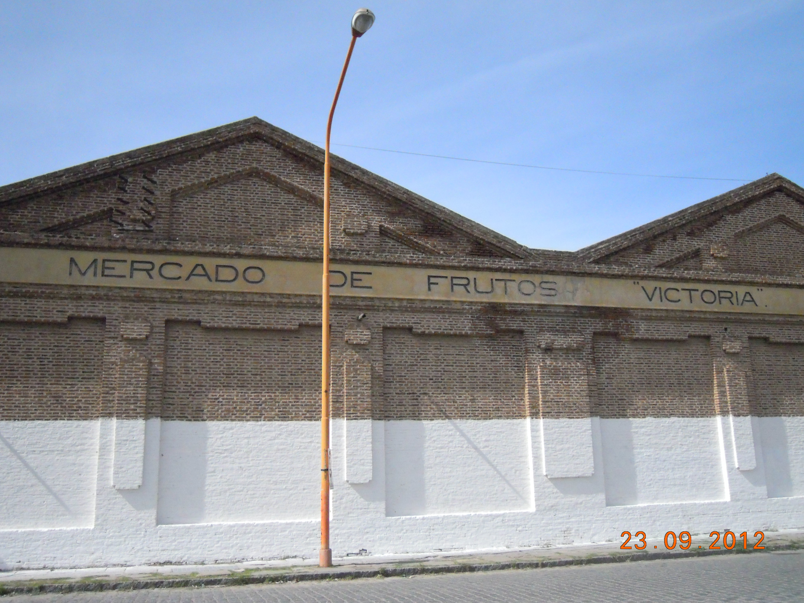 En Bahía Blanca-Provincia de Buenos Aires-República Argentina